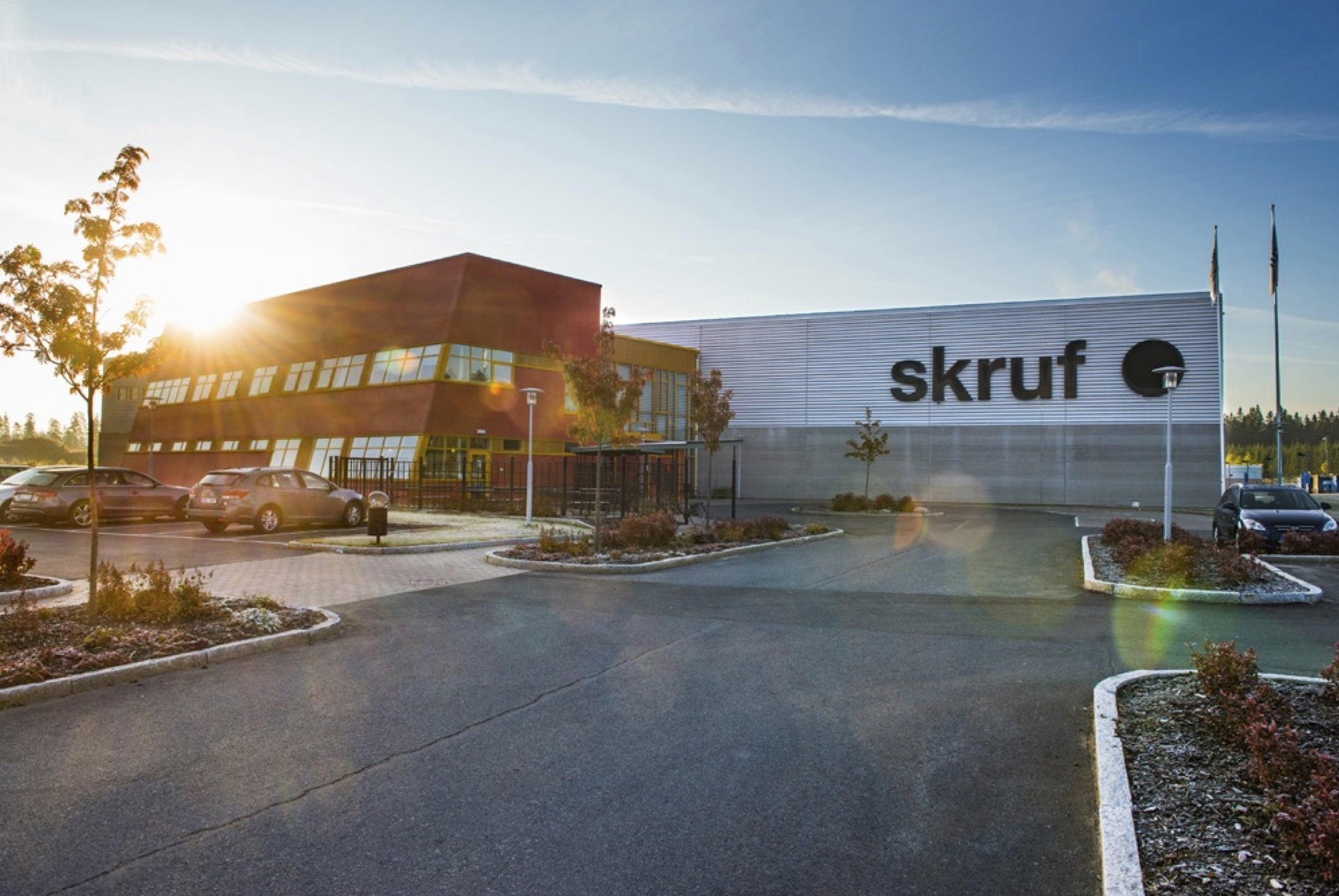 Skrufs produktionsanläggning i Sävsjö_High res